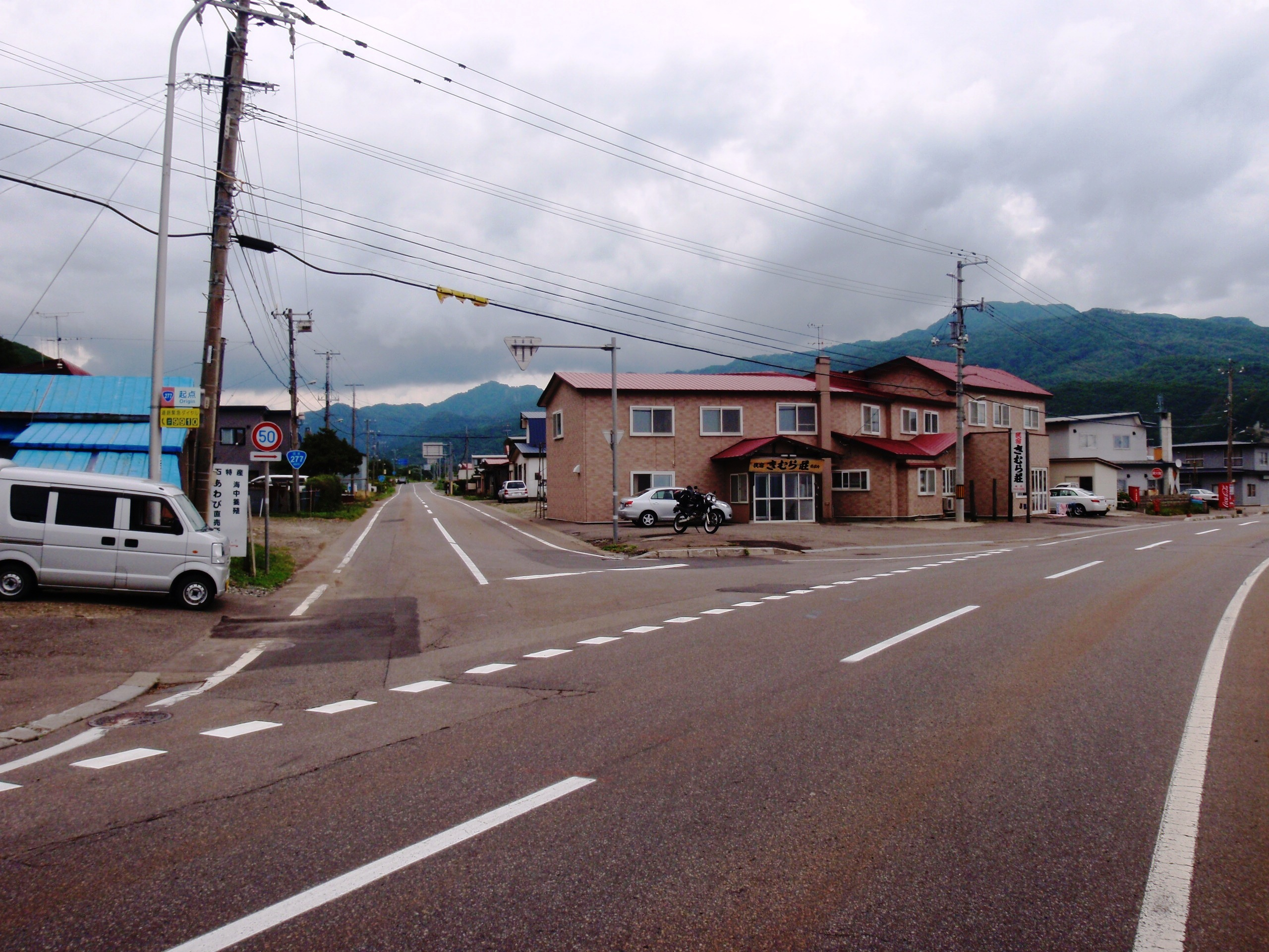 八雲町熊石鮎川交差点。左国道277号雲石峠方面。右国道229・277号重複区間江差方面。標識にはR277起点の文字。